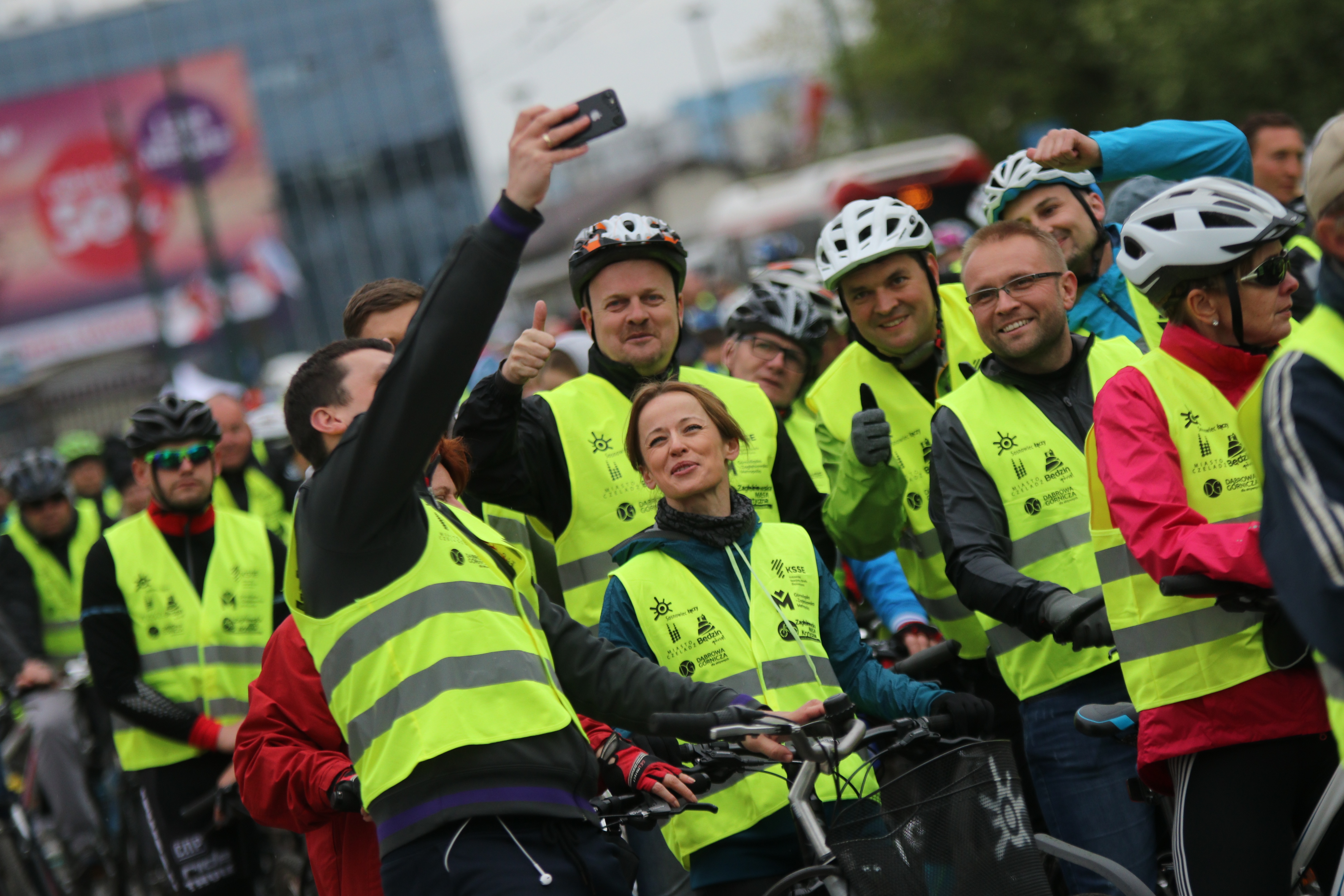 Prezydenci miast Zagłębia Dąbrowskiego: Arkadiusz Chęciński - Prezydent Sosnowca, Marcin Bazylak - Prezydent Dąbrowy Górniczej, Zbigniew Szaleniec - Burmistrz Czeladzi - podczas startu 12 Zagłębiowskiej Masy Krytycznej